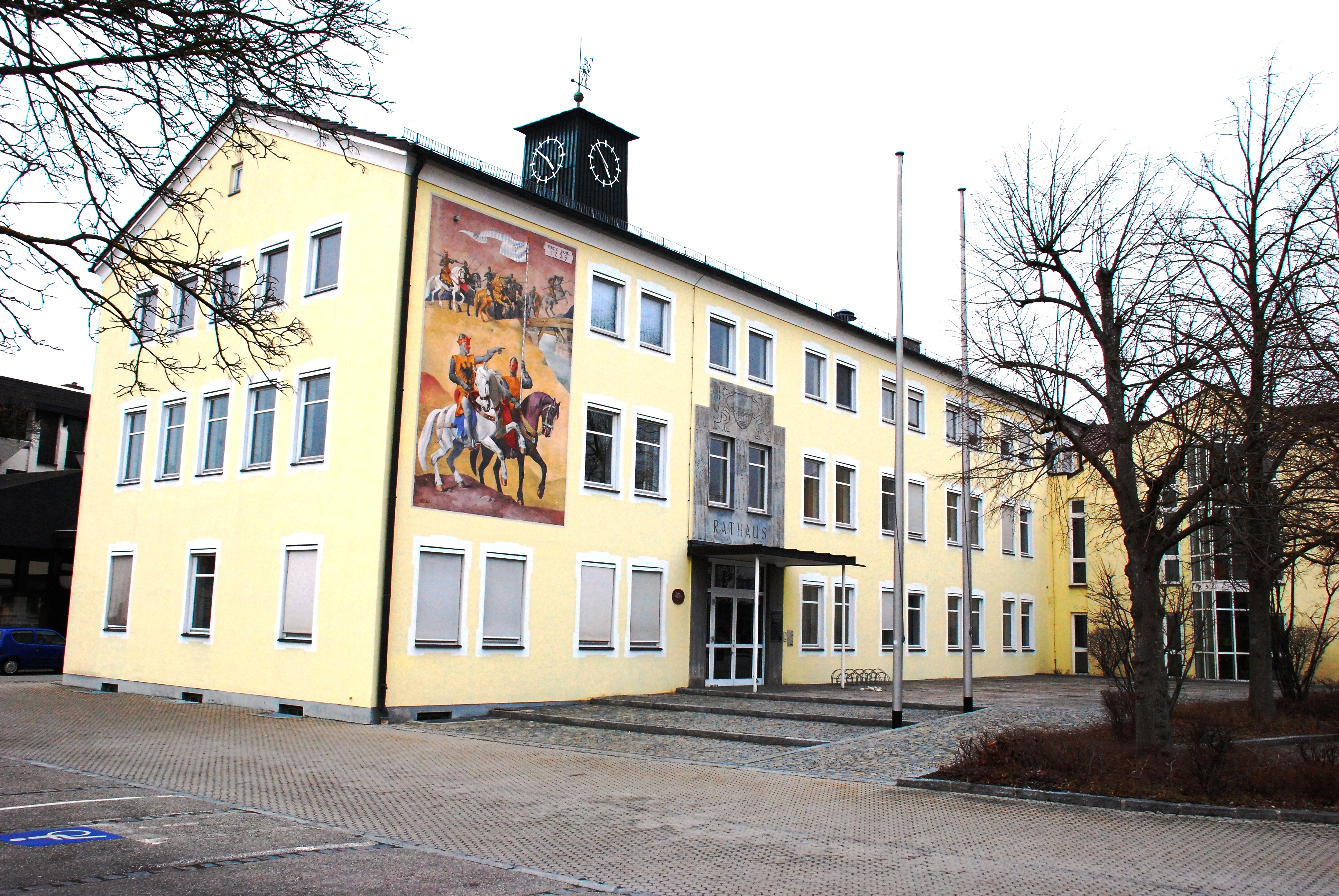 Rathaus von Garching an der Alz, Landkreis Altötting, Regierungsbezirk Oberbayern